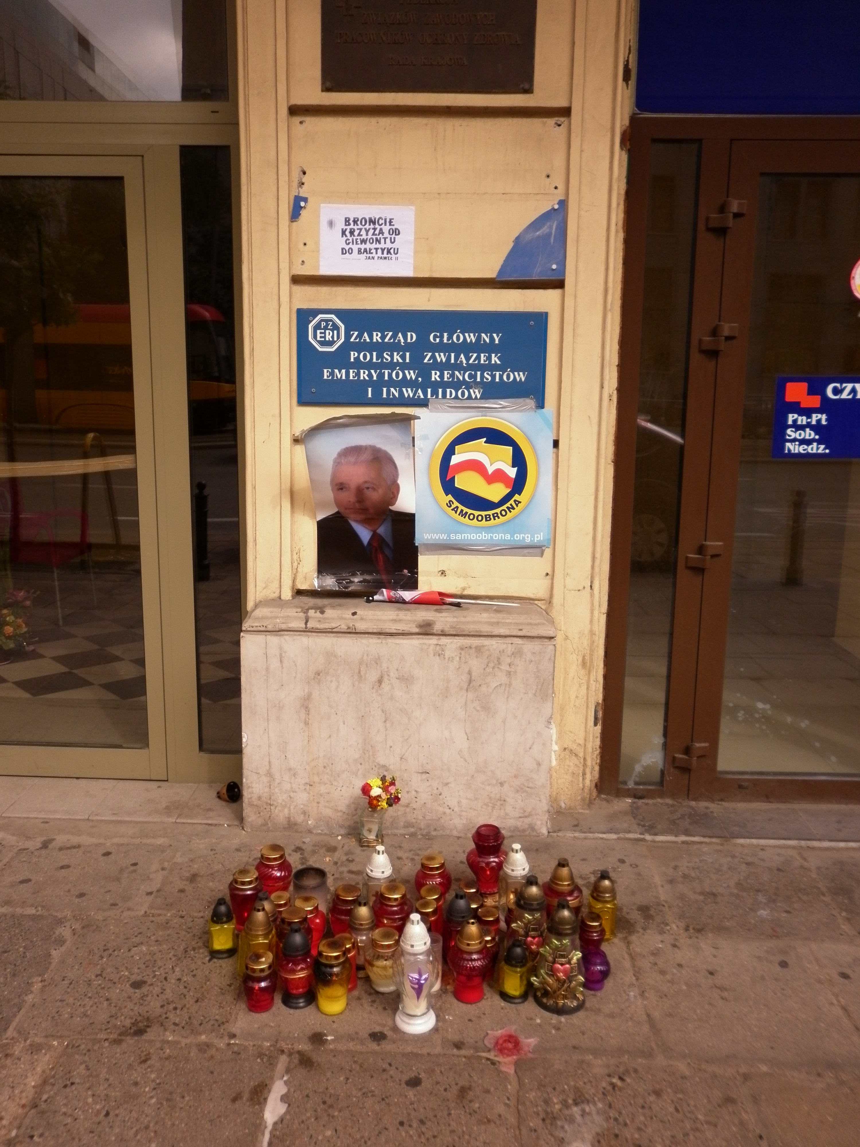 Siedziba Samoobrony w Warszawie